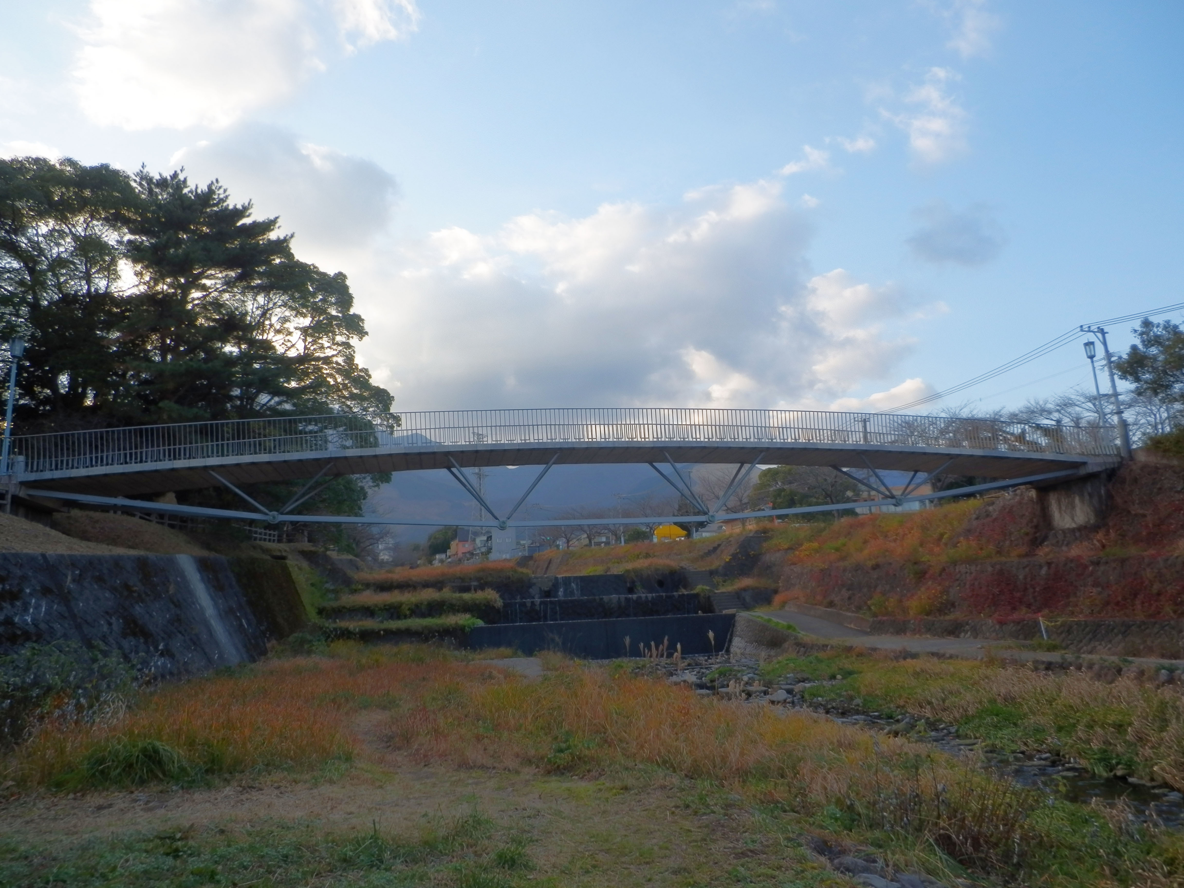 大分県別府市にあるイナコスの橋